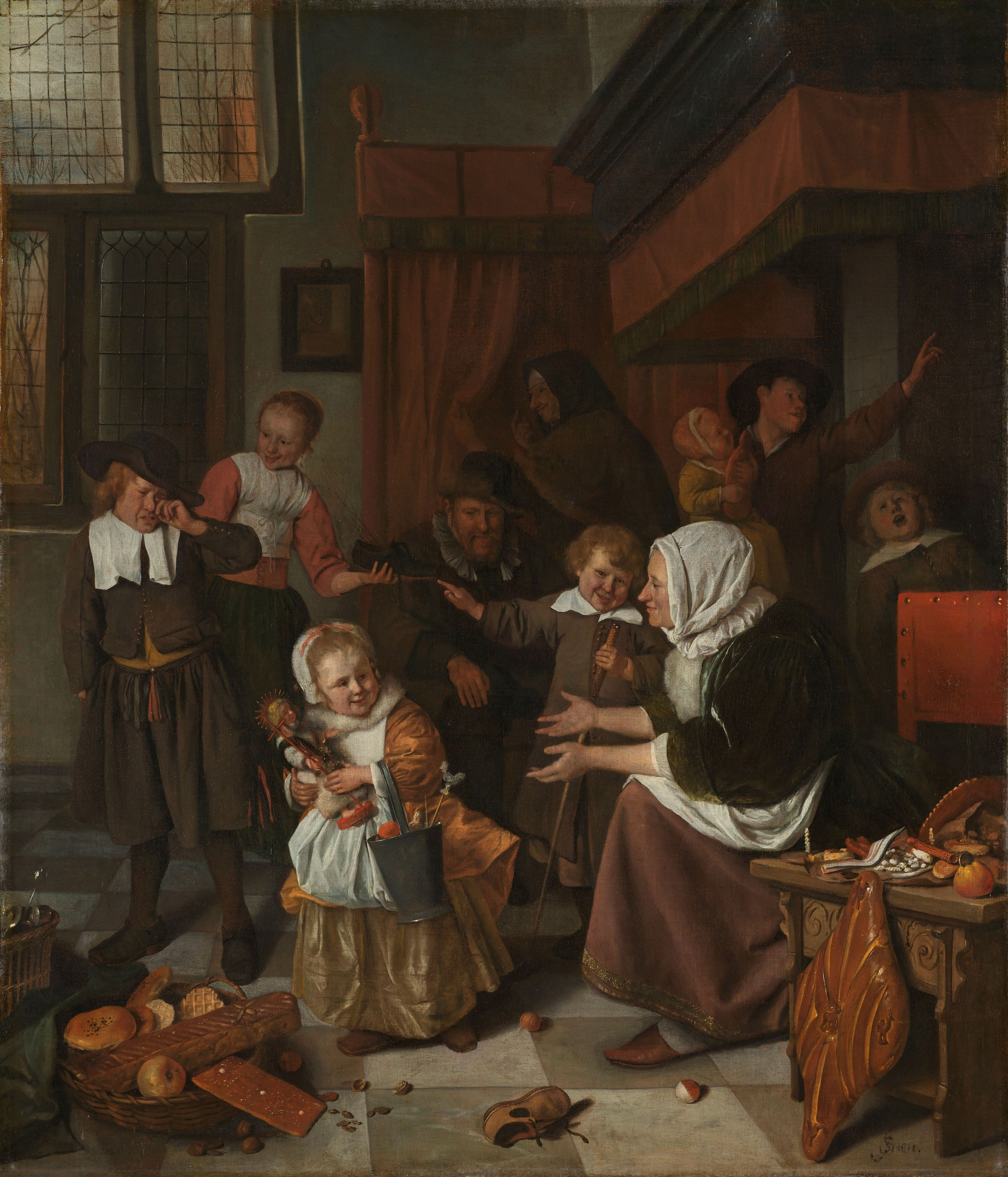 Interieur waarin een familie het Sint Nicolaasfeest viert. In het midden een meisje met in haar armen een Johannes de Doper-pop en een emmer met snoep. Links een huilende jongen die een roe in zijn schoen heeft gekregen. Naast de moeder met uitgestoken armen staat een lachende jongen met een kolfstok. Op de vloer staat een mand met koeken en broodjes, bij de schoorsteen zingen enkele jongeren een sinterklaaslied. Op de achtergrond een oudere man en vrouw.; Jan Havicksz Steen (ca. 1625–1679), olieverf op doek, 1665–1668